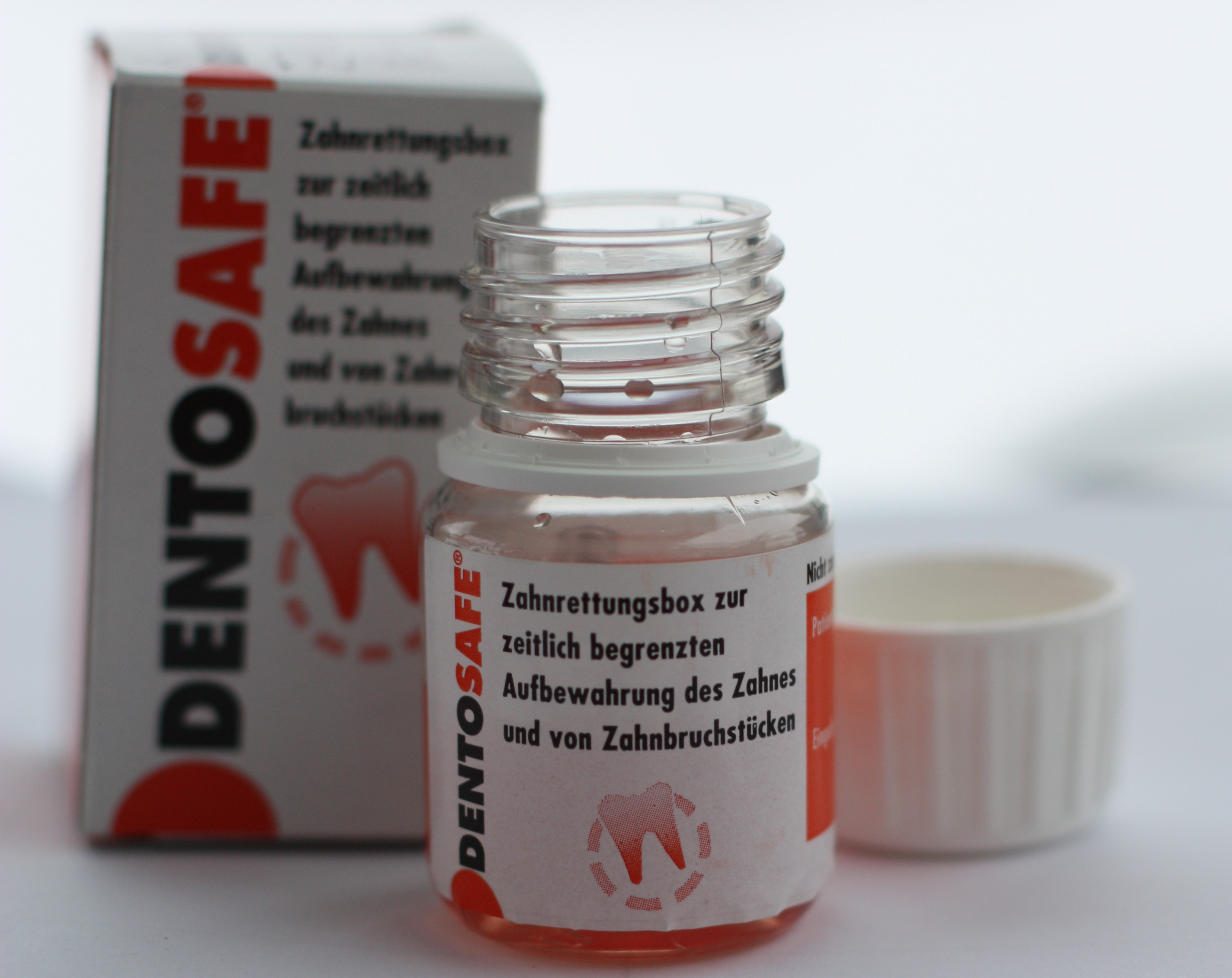 Zahnrettungsbox, Frontzahntrauma, Dental traumas